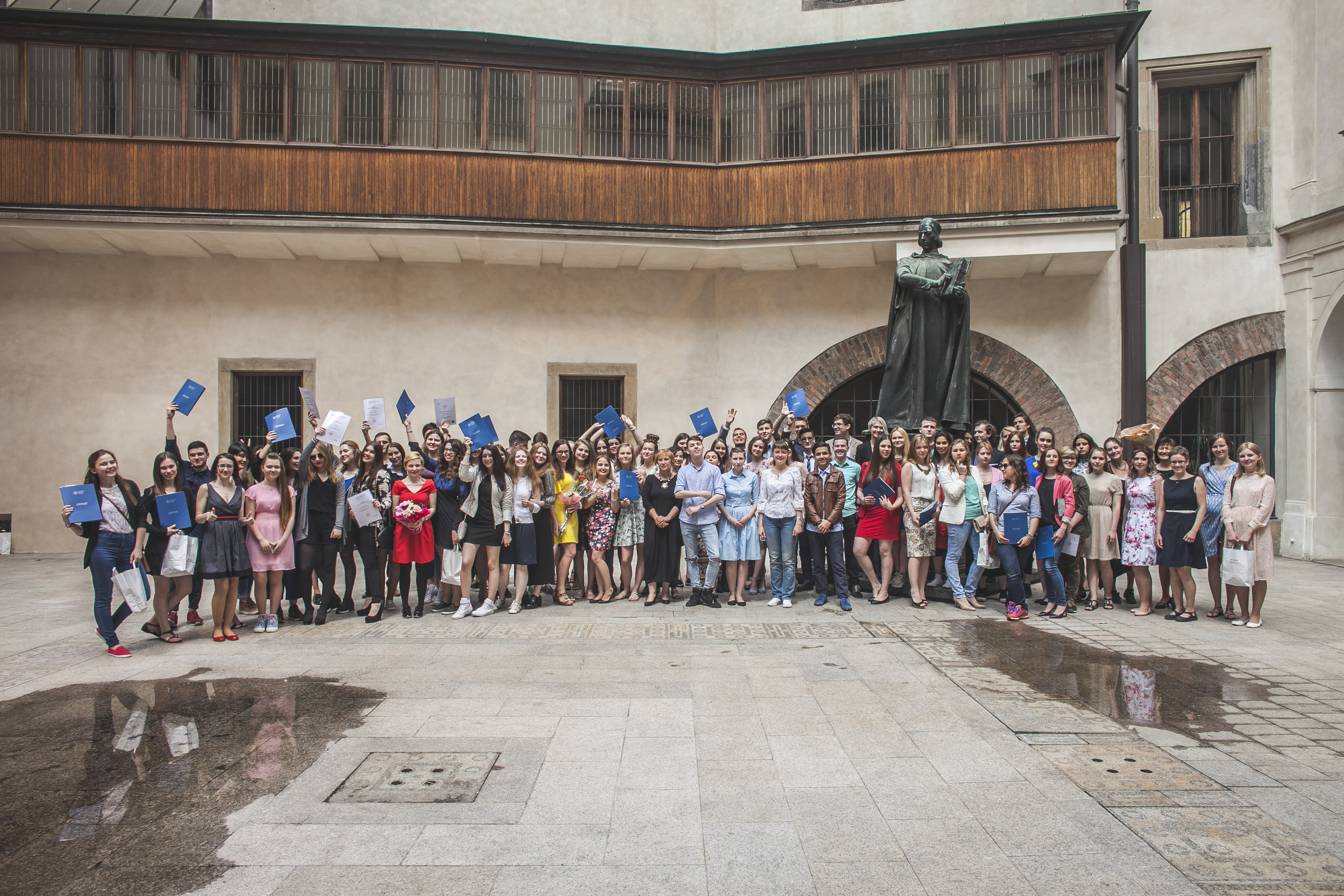 Студенты учебного центра Прага - Кристалл. Фото: Дита Хавранкова